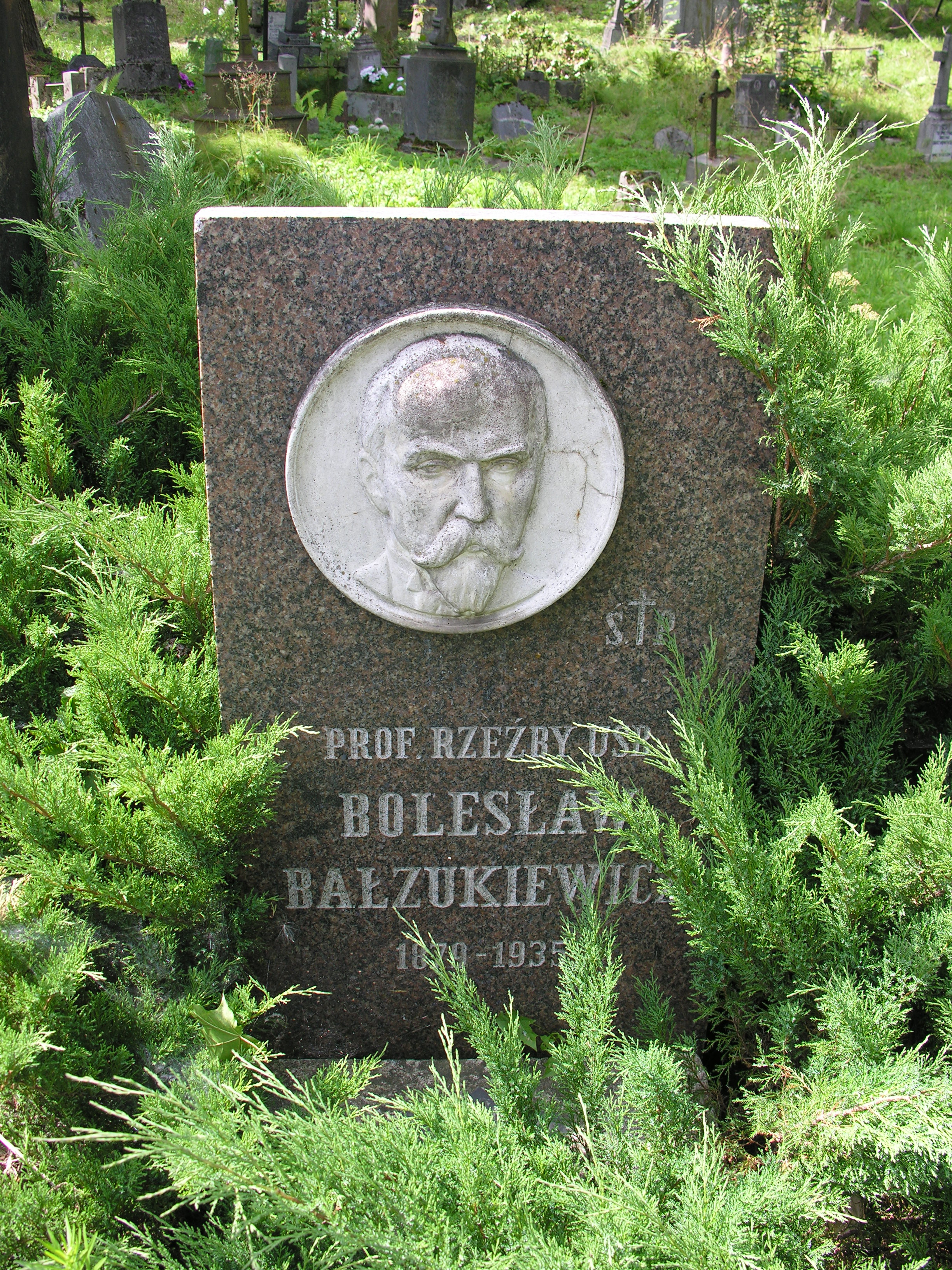 Grób Bolesława Bałzukiewicza